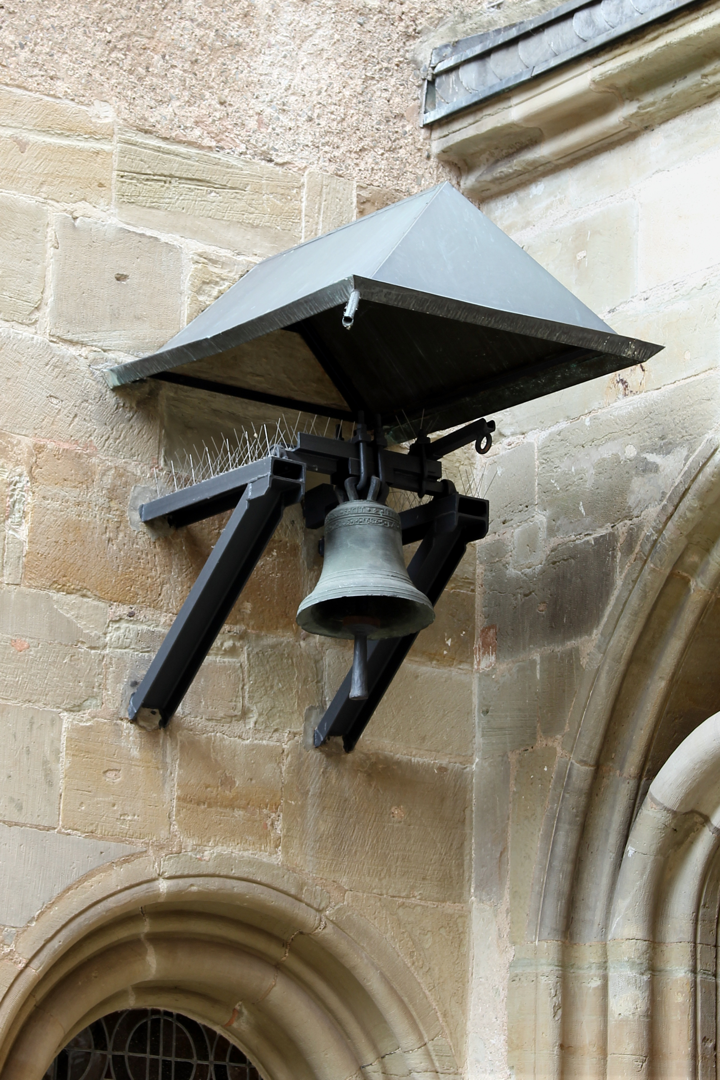 Glocke am Kreuzgang des Trierer Doms, 1682 von dem Trierer Glockengießer Matthias Crommel gegossen. Bis 1927 schlug sie die Viertelstunden der Domuhr. Möglicherweise stammt die Glocke ursprünglich aus der Lambertuskirche des 1802 aufgehobenen Seminarium nobilium oder Seminarium ad S. Lambertum in der Dietrichstraße.